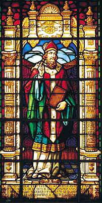 Vitral con la imagen del obispo de Huesca Vidal de Canellas